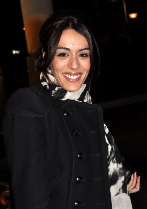 Sofia Essaïdi aux NRJ Music Awards